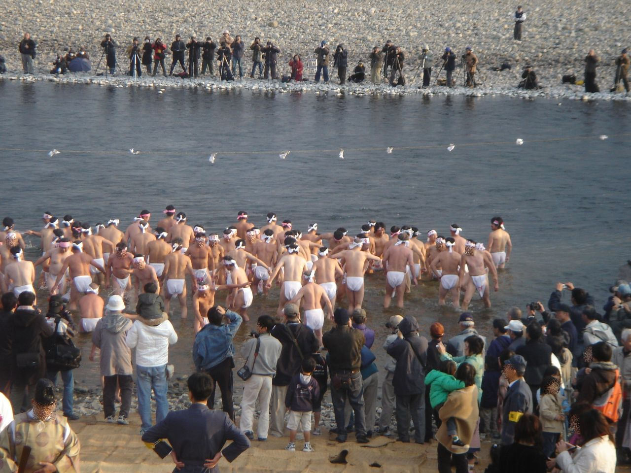 Ikenoue Misogi Matsuri（池ノ上みそぎ祭）,Gifu,Gifu,Japan(岐阜県岐阜市)の長良川で撮影。